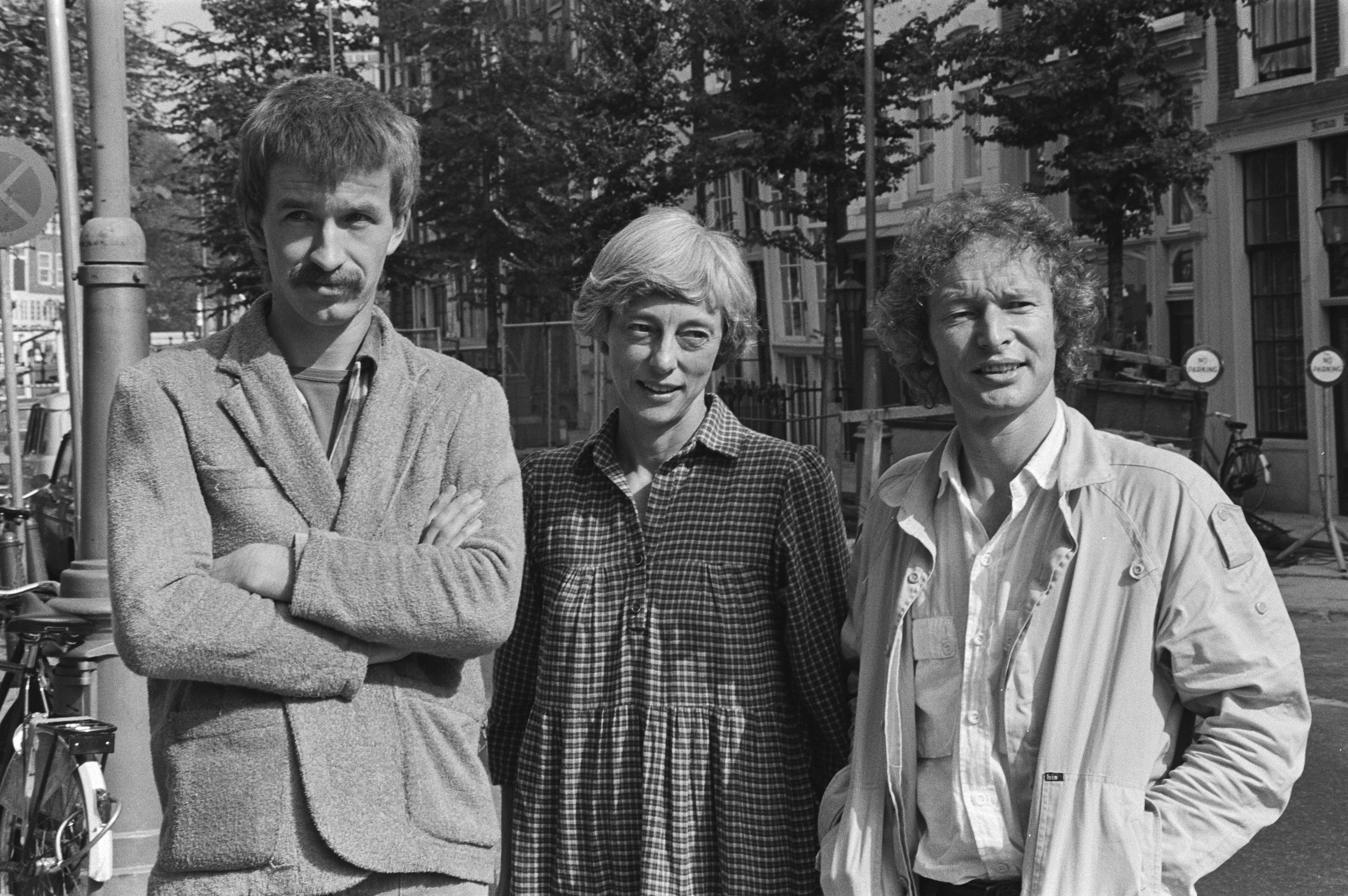 Bekroonde kinderboeken. V.l.n.r. de prijswinnars illustrator Tom Eyzenbach (Gouden Penseel), Virginia Allen Jensen (Boeken Sleutel), en Guus Kuijer (Gouden Griffel) 10 september 1979